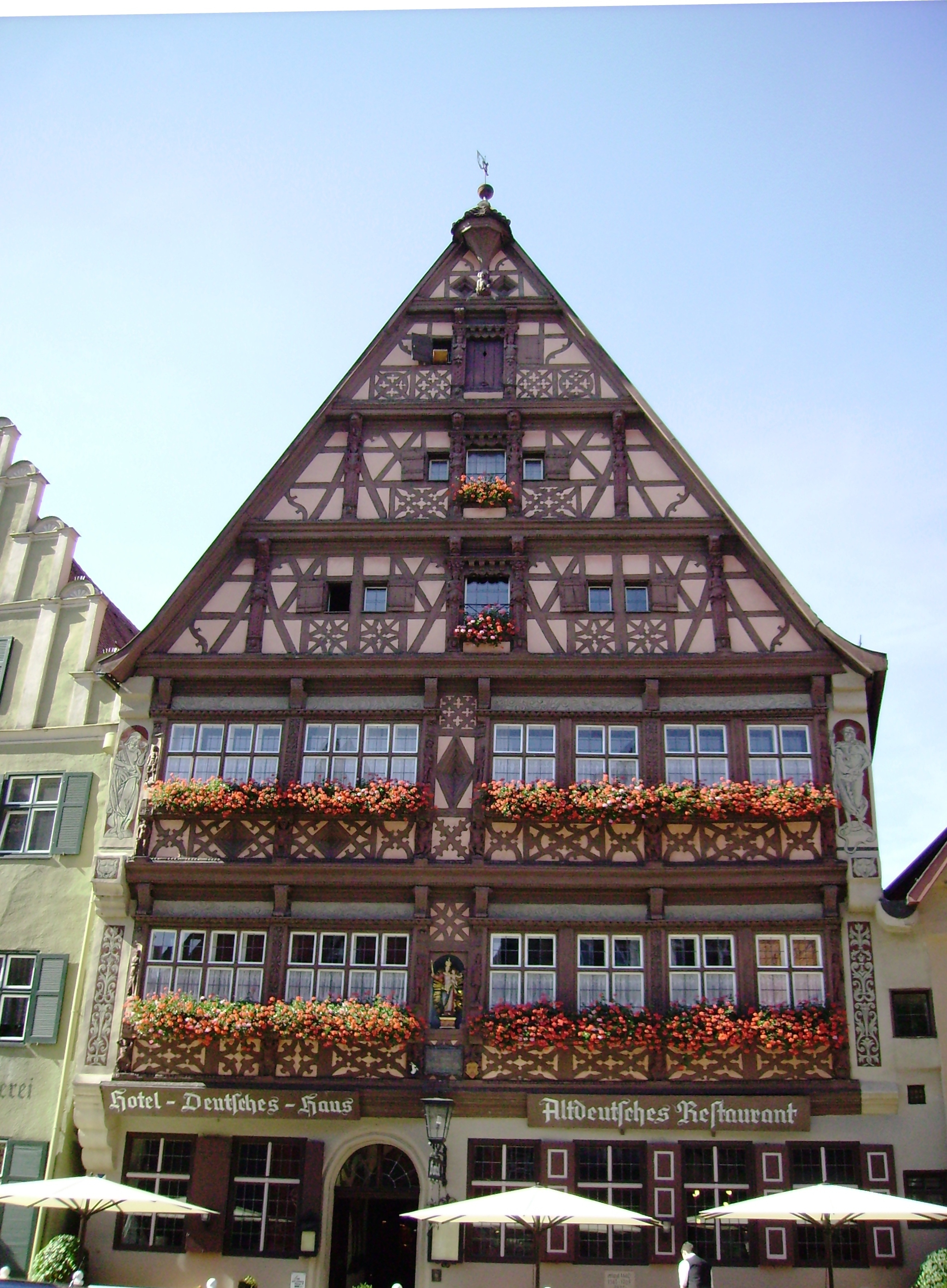 Hotel Deutsches Haus Dinkelsbuehl